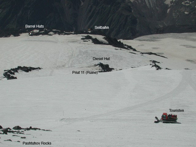 Aufstieg zum Elbrus, Hütten und Einrichtungen am Weg, Foto aufgenommen August 2004 bei den Pashtuhov Rocks